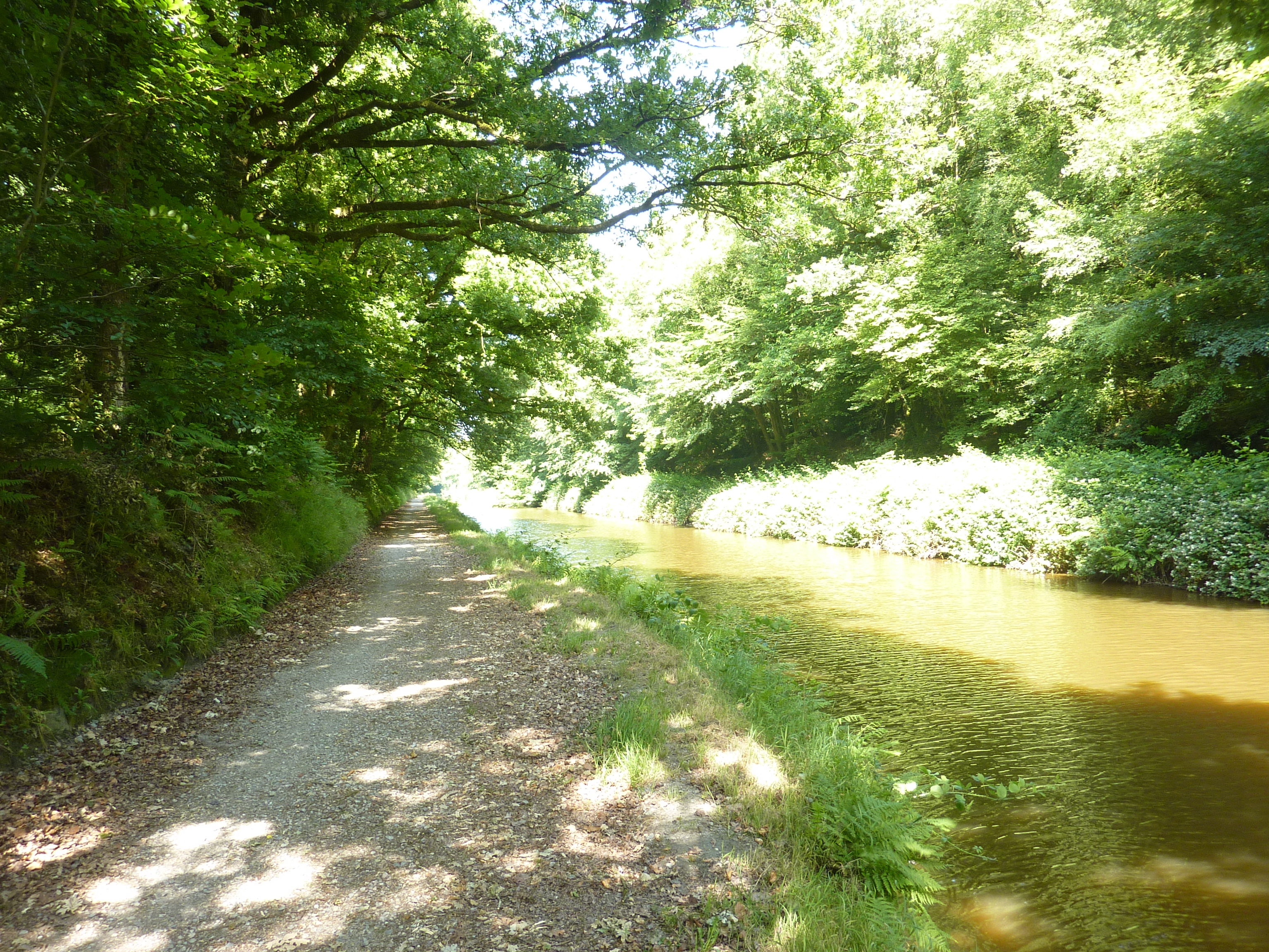 La Grande Tranchée de Glomel sur le canal de Nantes à Brest